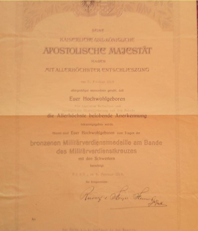 Signum Laudis - dyplom